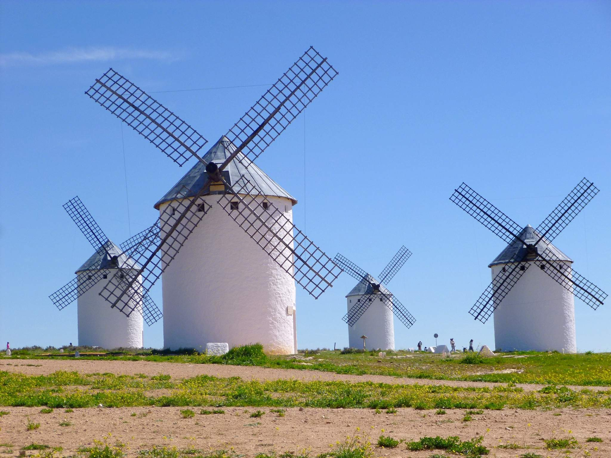 Sierra de los Molinos, Campo de Criptana (Ciudad Real)